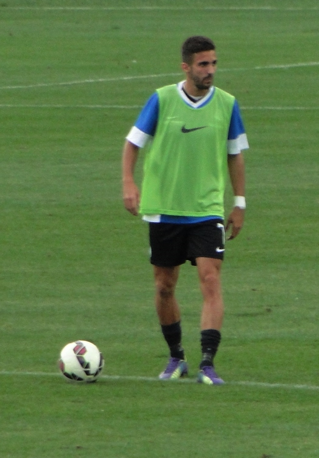 Marco D'Alessandro, calciatore italiano, con la maglia dell'Atalanta